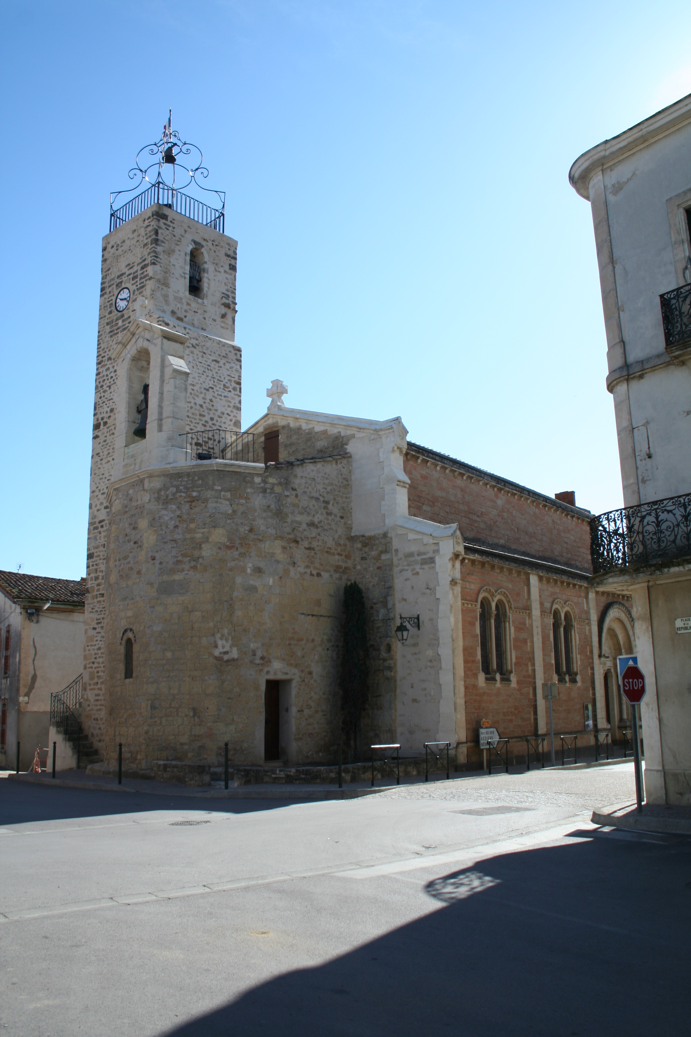 Lieuran-lès-Béziers (Hérault) - église Saint-Martin.